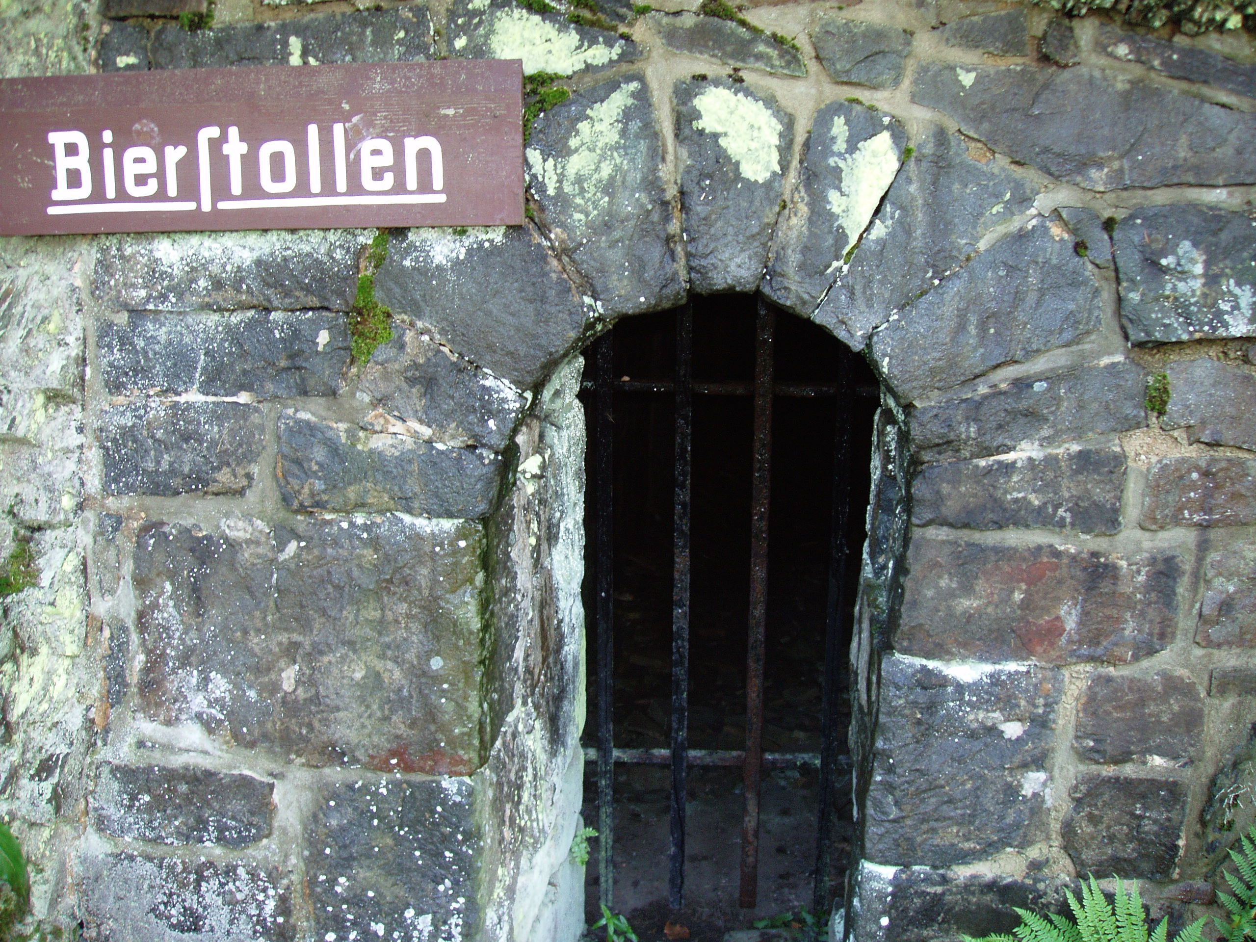 Mundloch des "Bierstollens", der als Getränkekeller des Maaßener Gaipels diente.